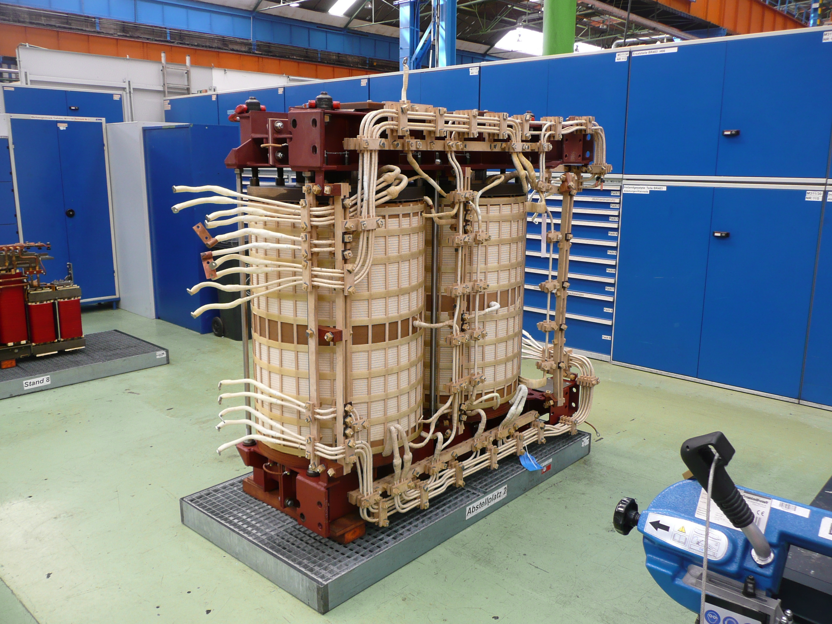 Aktivteil des Trafos der BR 401 in der Trafowerkstatt des AW Dessau